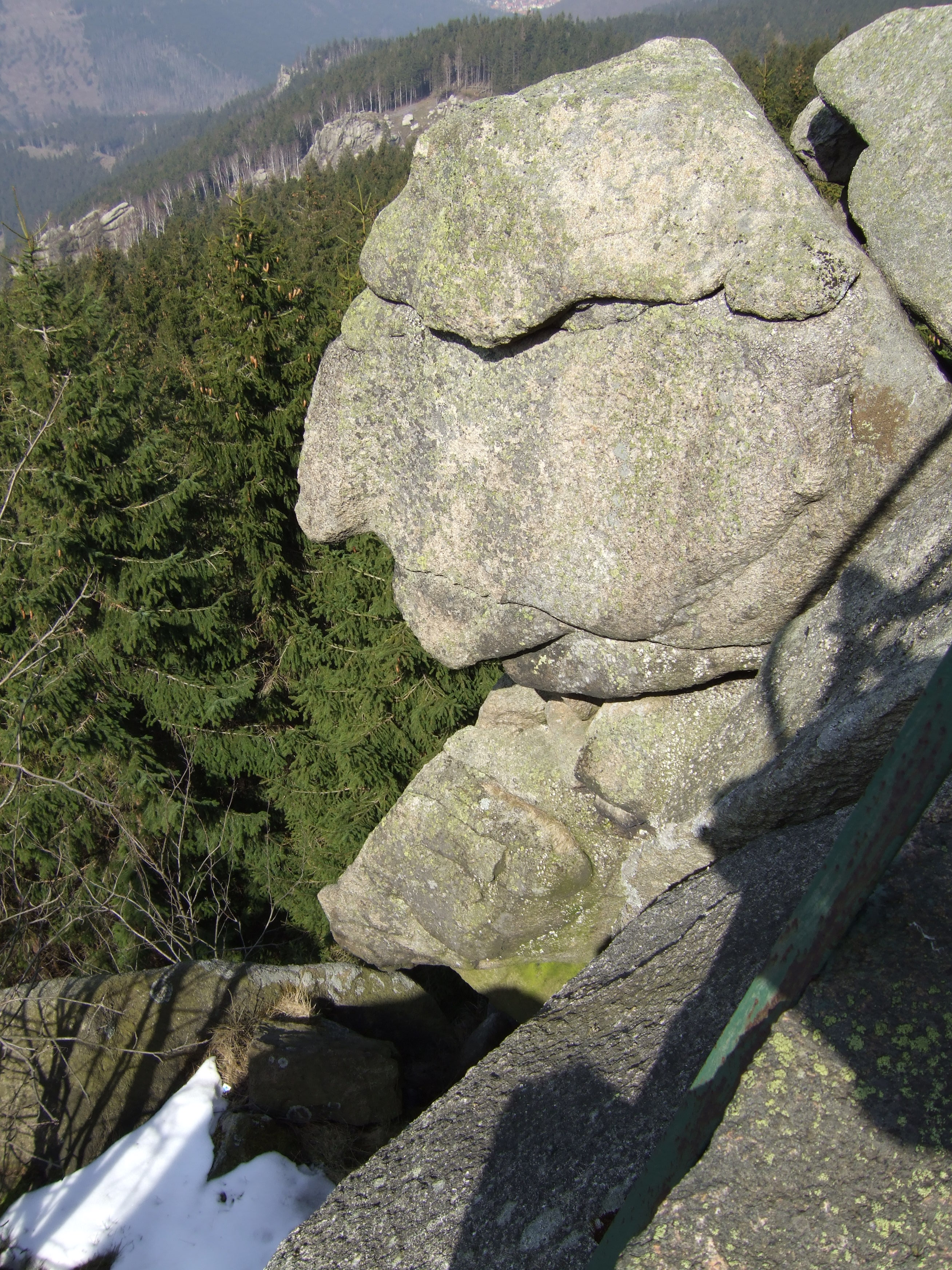 Felsen "Der Alte vom Berge" an den Kästeklippen oberhalb des Okertals